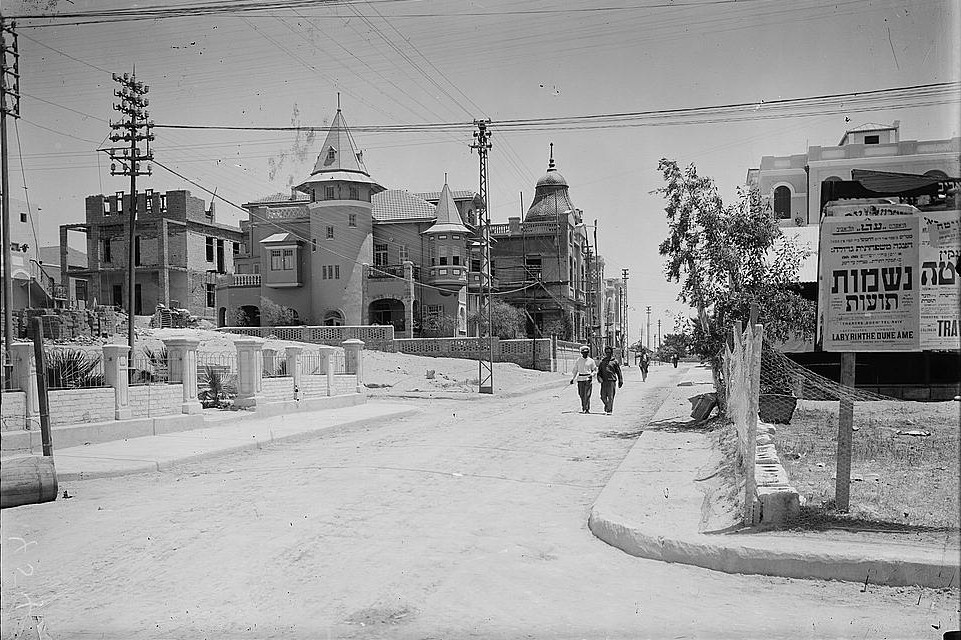 Nachlat Benjamin st. 69, Tel Aviv